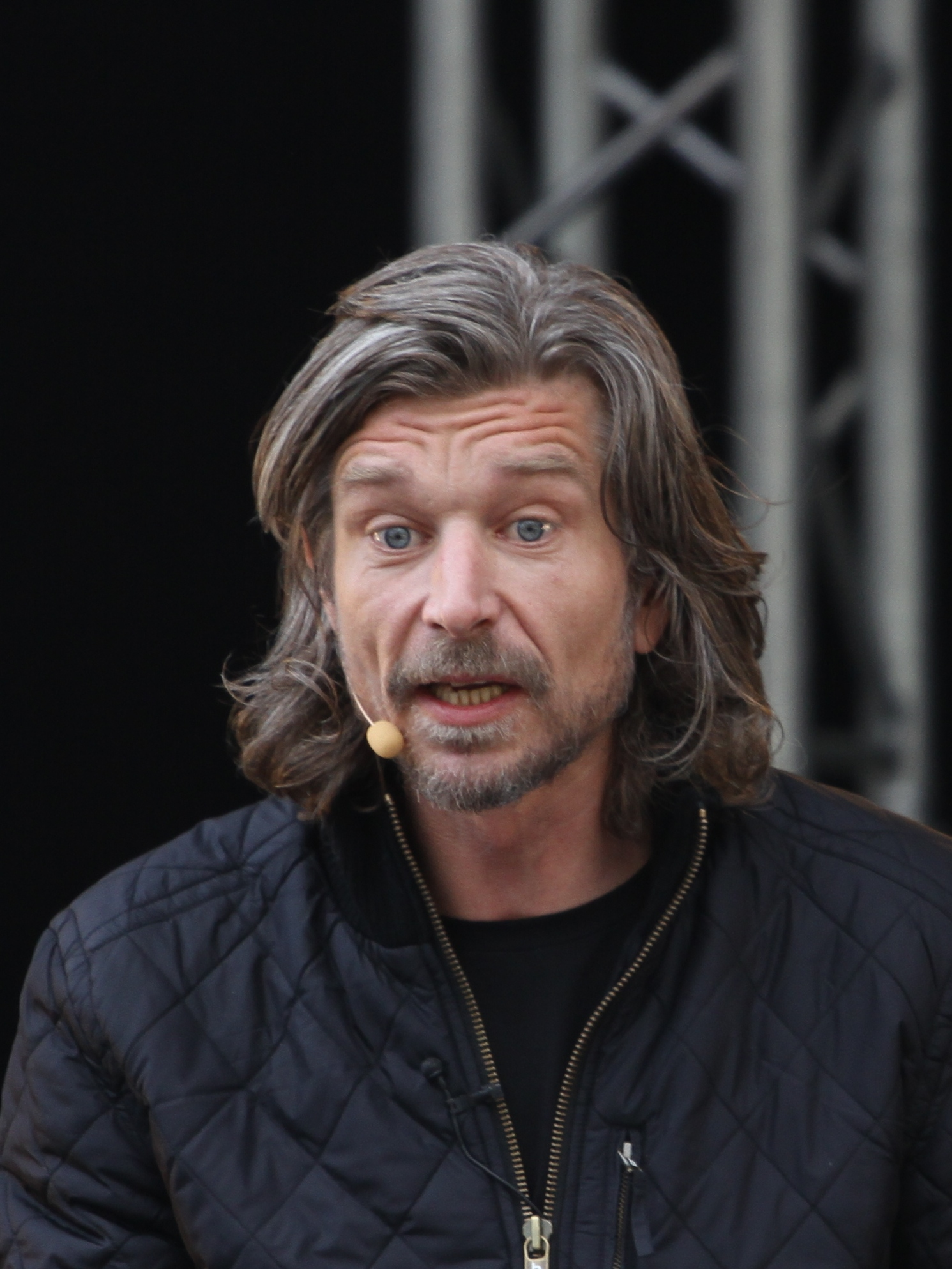 Karl Ove Knausgård under Oslo bokfestival 2010.